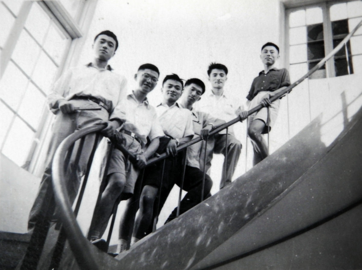 中文（中国大陆）: 1963年上海印刷技术研究所字体设计师的合影。从左至右：陈其瑞、张家声、过祖良、陈永海、许柏康、徐学成。